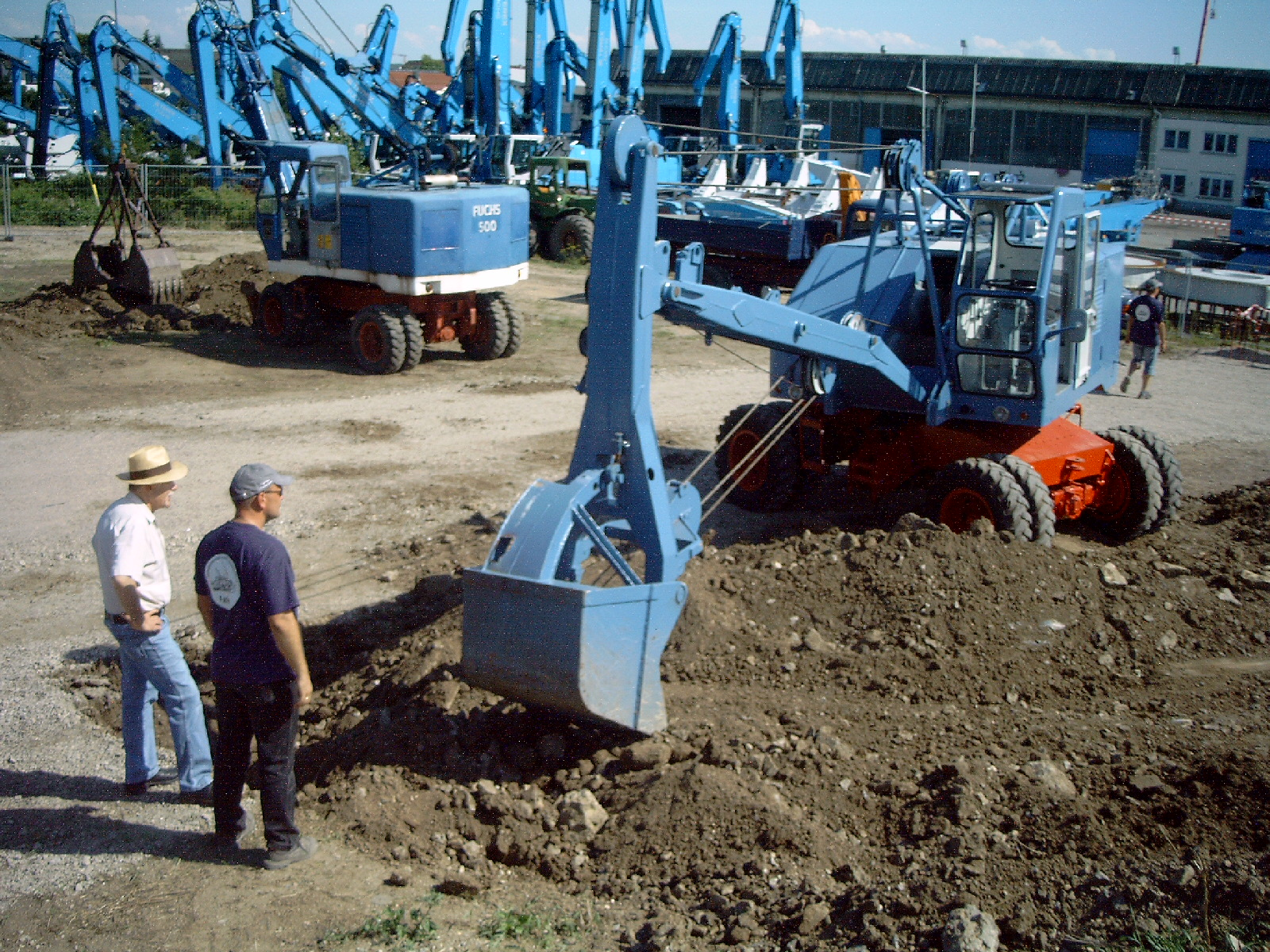 Fuchs Bagger beim 50. Jubiläum des Herstellers in Bad Schönborn